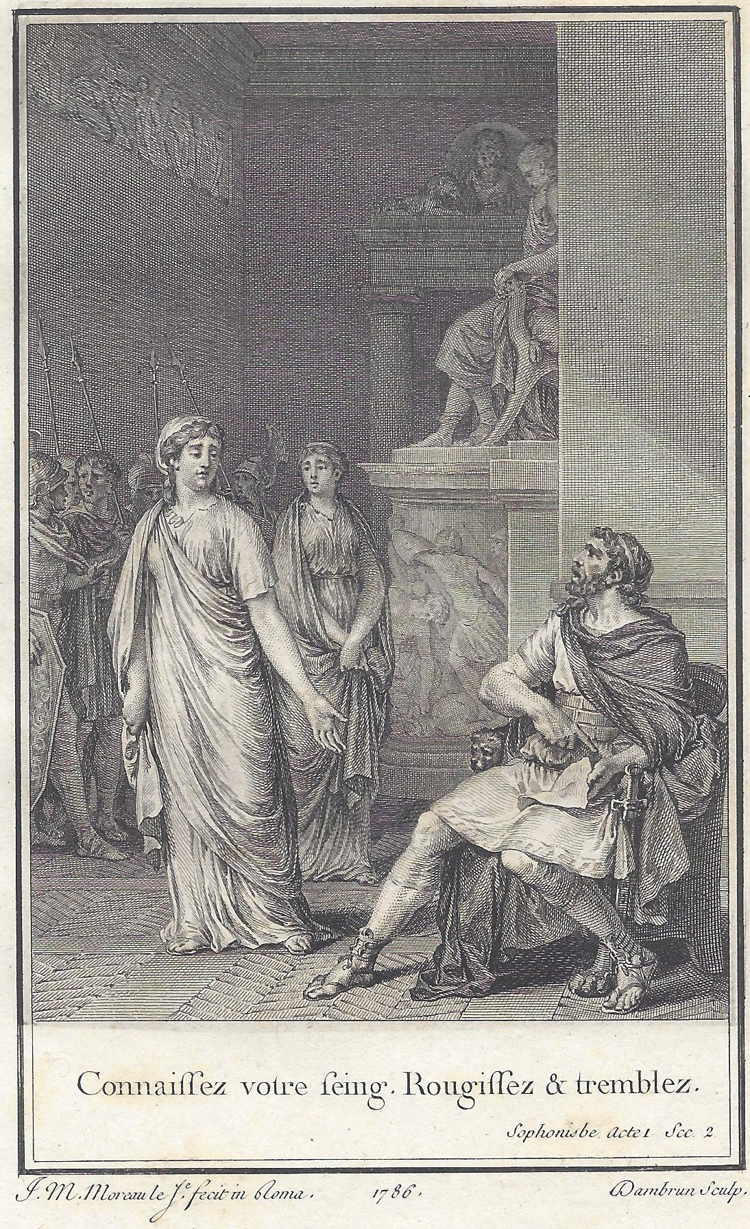 Voltaire: Sophonisbe Akt 1 Szene 2 Kupferstich von Jean Dambrun nach Jean-Michel Moreau